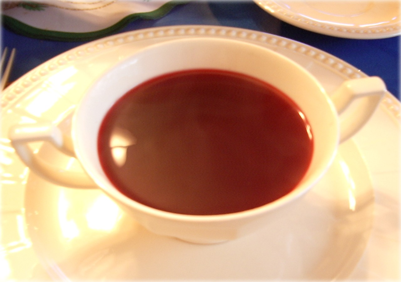 barszcz